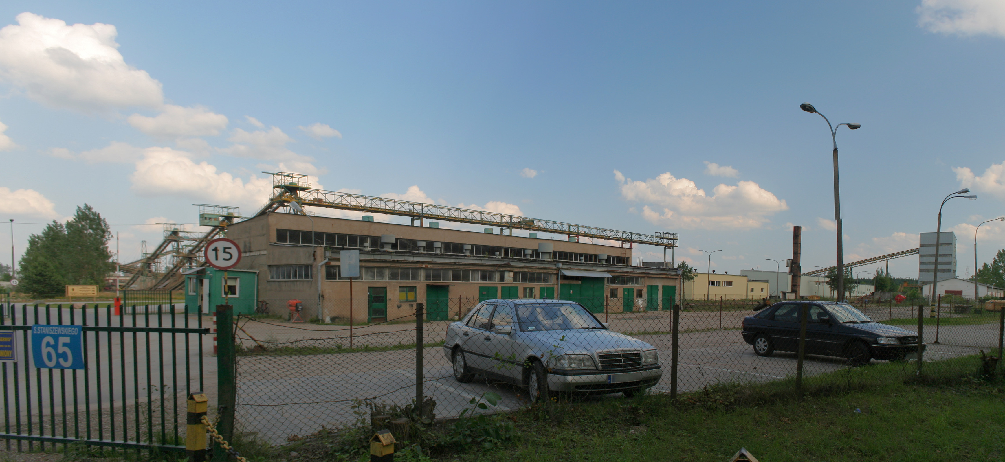 Suwalskie Kopalnie Surowców Mineralnych.